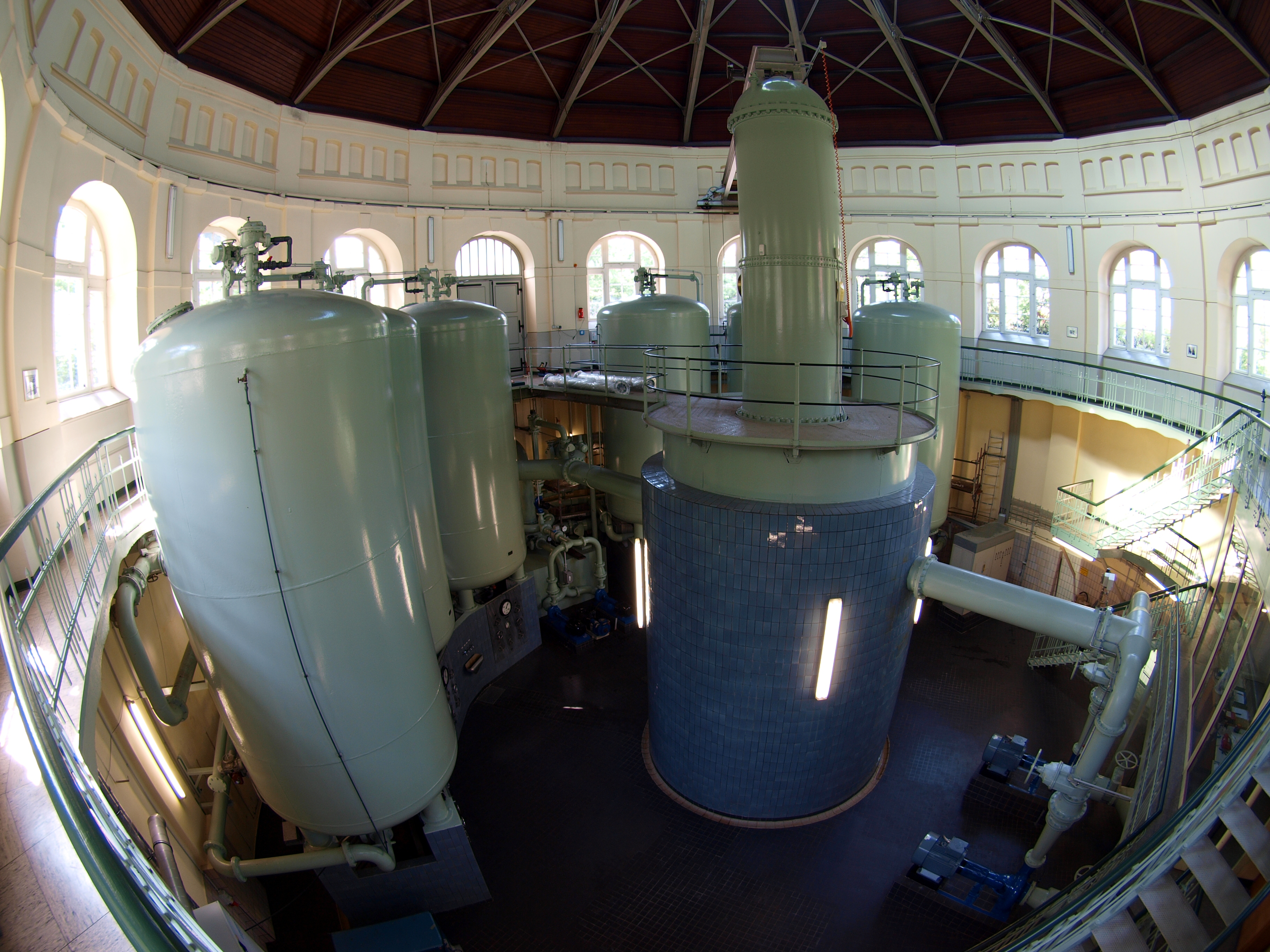 Innenansicht des Wasserwerks Hohe Ward